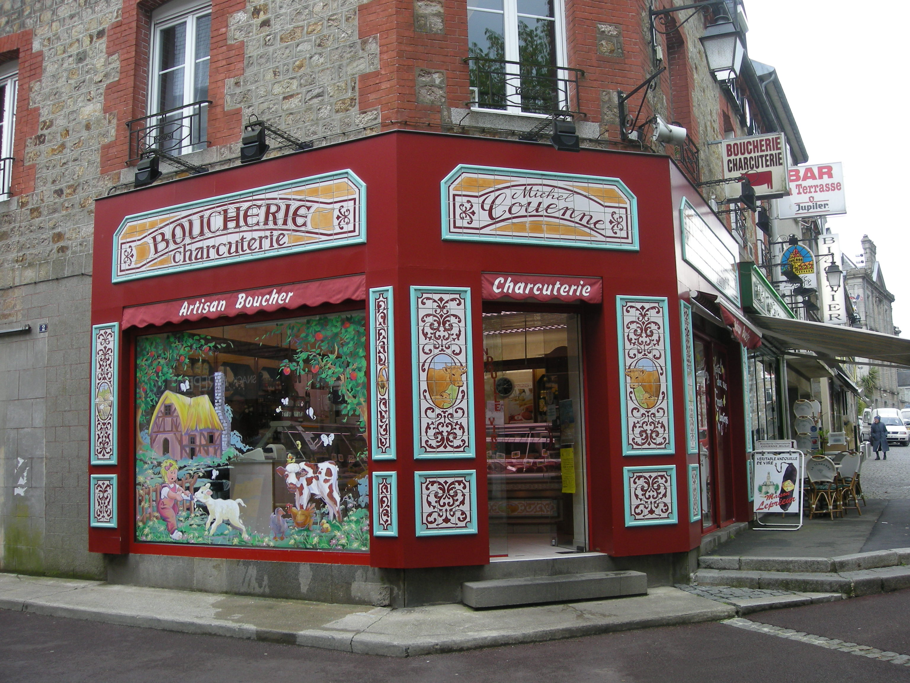 Une boucherie à Villedieu-les-Poêles (Manche, Normandie)